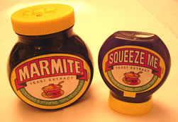 Marmite jars